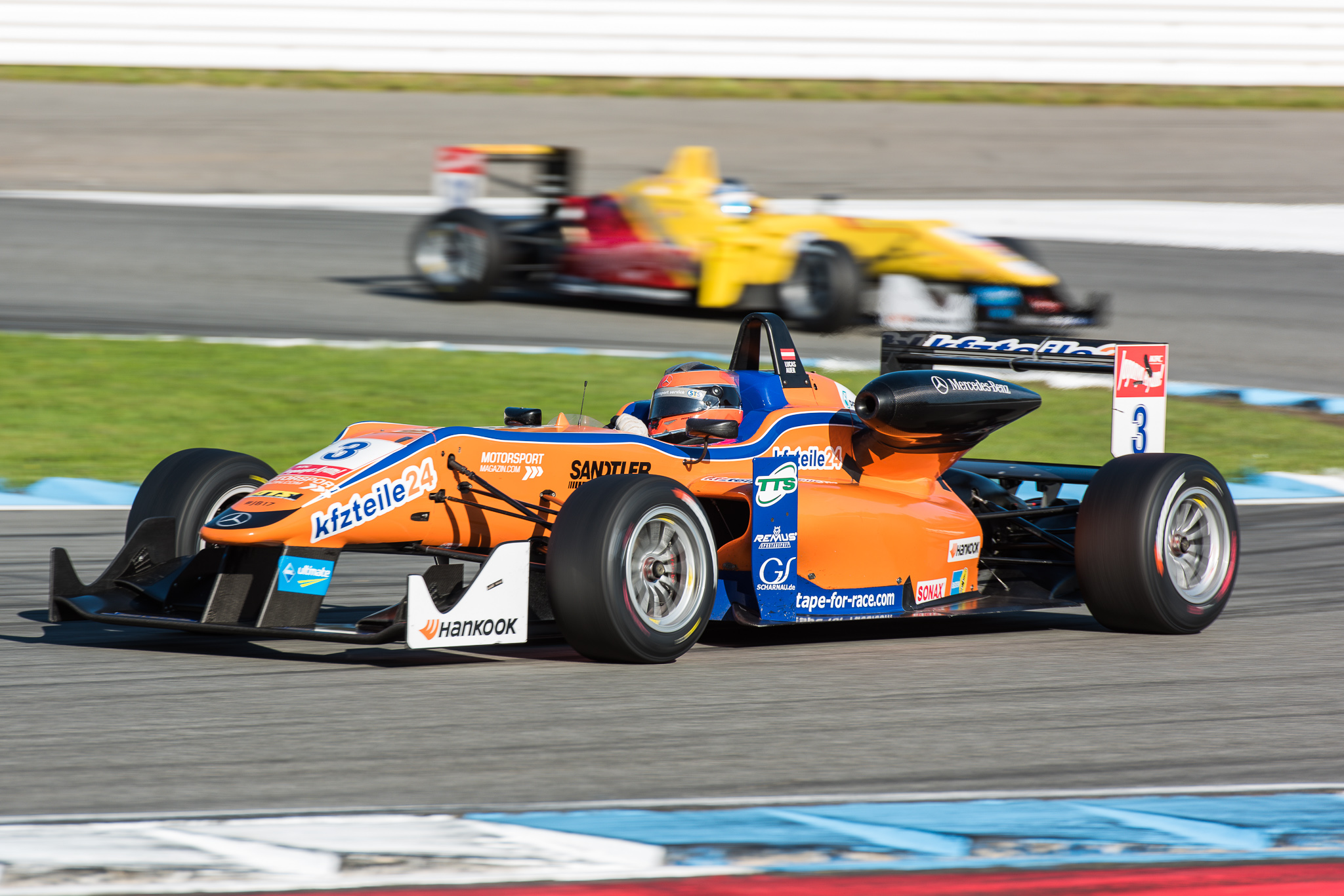 DTM,Dallara F312,Deutsche Tourenwagen Masters,F3 FIA European Championship,FIA Formel 3 Europameisterschaft,Hockenheimring,Lucas Auer,Mercedes-Benz,Motorsport,Mücke Motorsport,kfzteile24